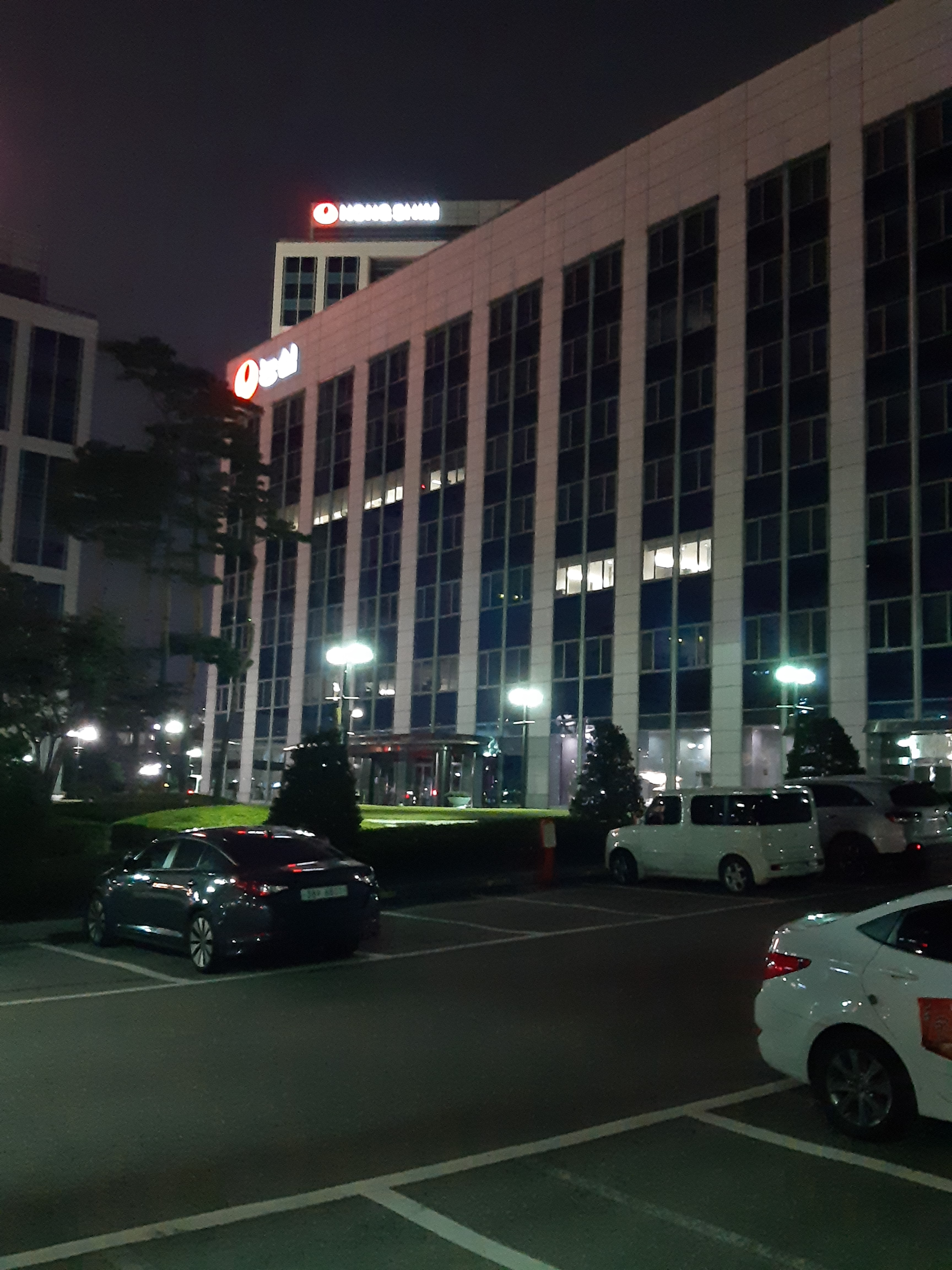 서울시 동작구 대방동에 있는 농심 본사